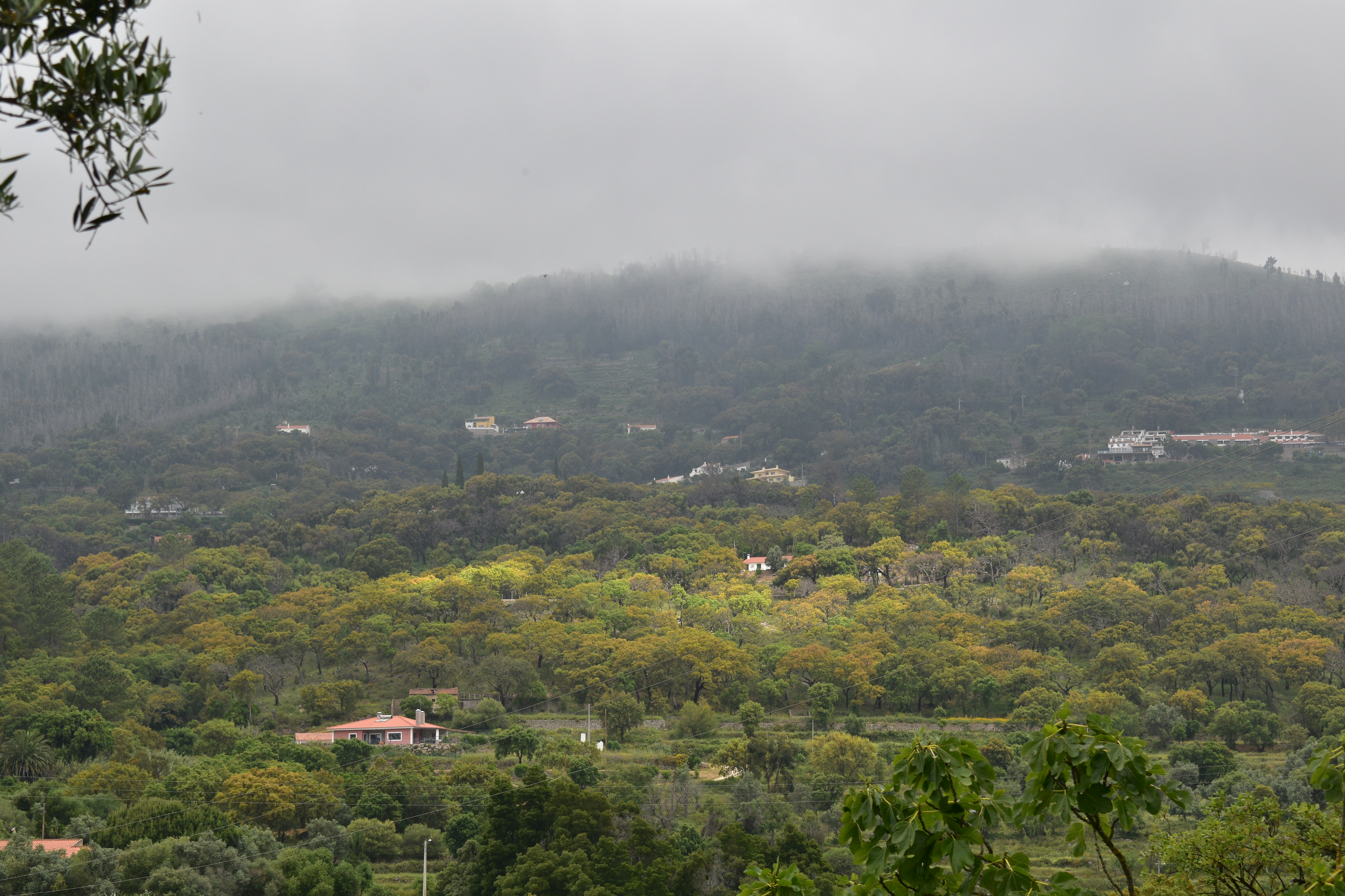 Monchique, Algarve - Portugal